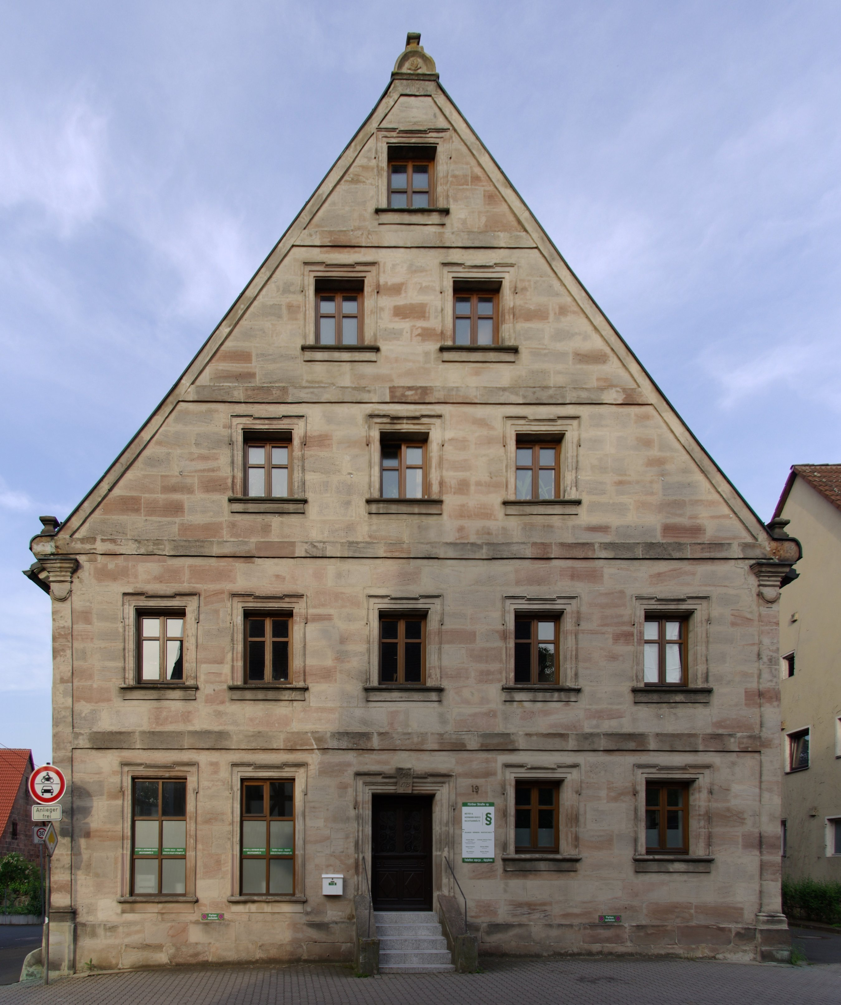 Ehemaliges Gasthaus Zum Schwarzen Adler, Fürther Straße 19 (früher Haus Nr. 91) im Erlanger Stadtteil Bruck